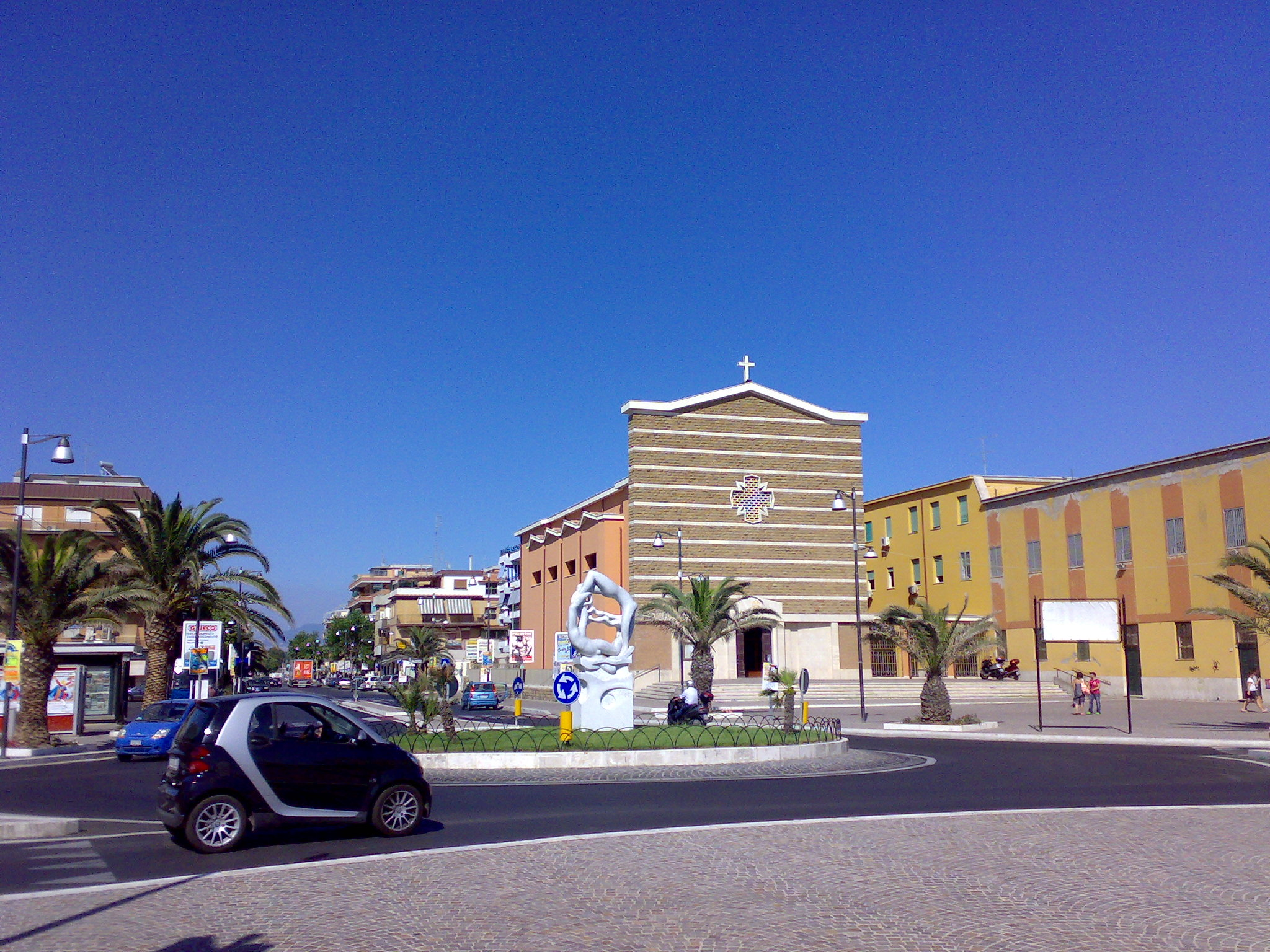 Rotatoria di Piazza Ungheria, sullo sfondo la chiesa di Torvaianica